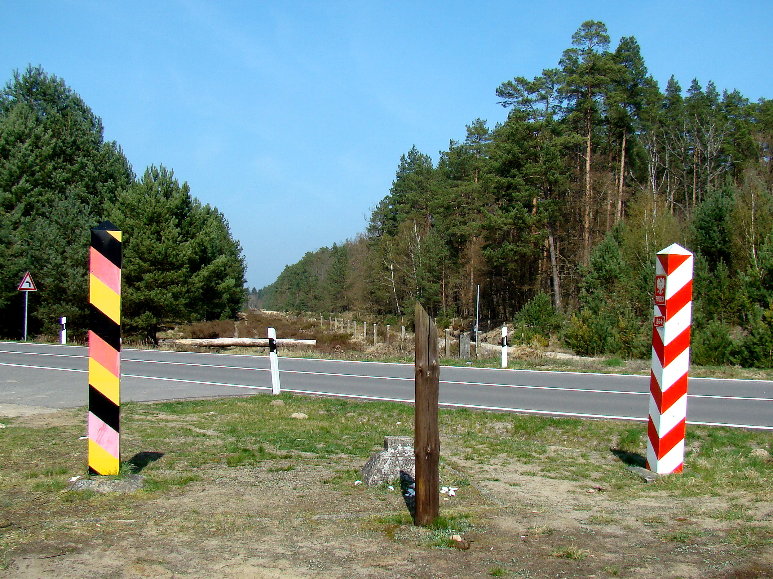 Granica państwowa polsko-niemiecka, znak graniczny nr. 864, okolice Dobieszczyna